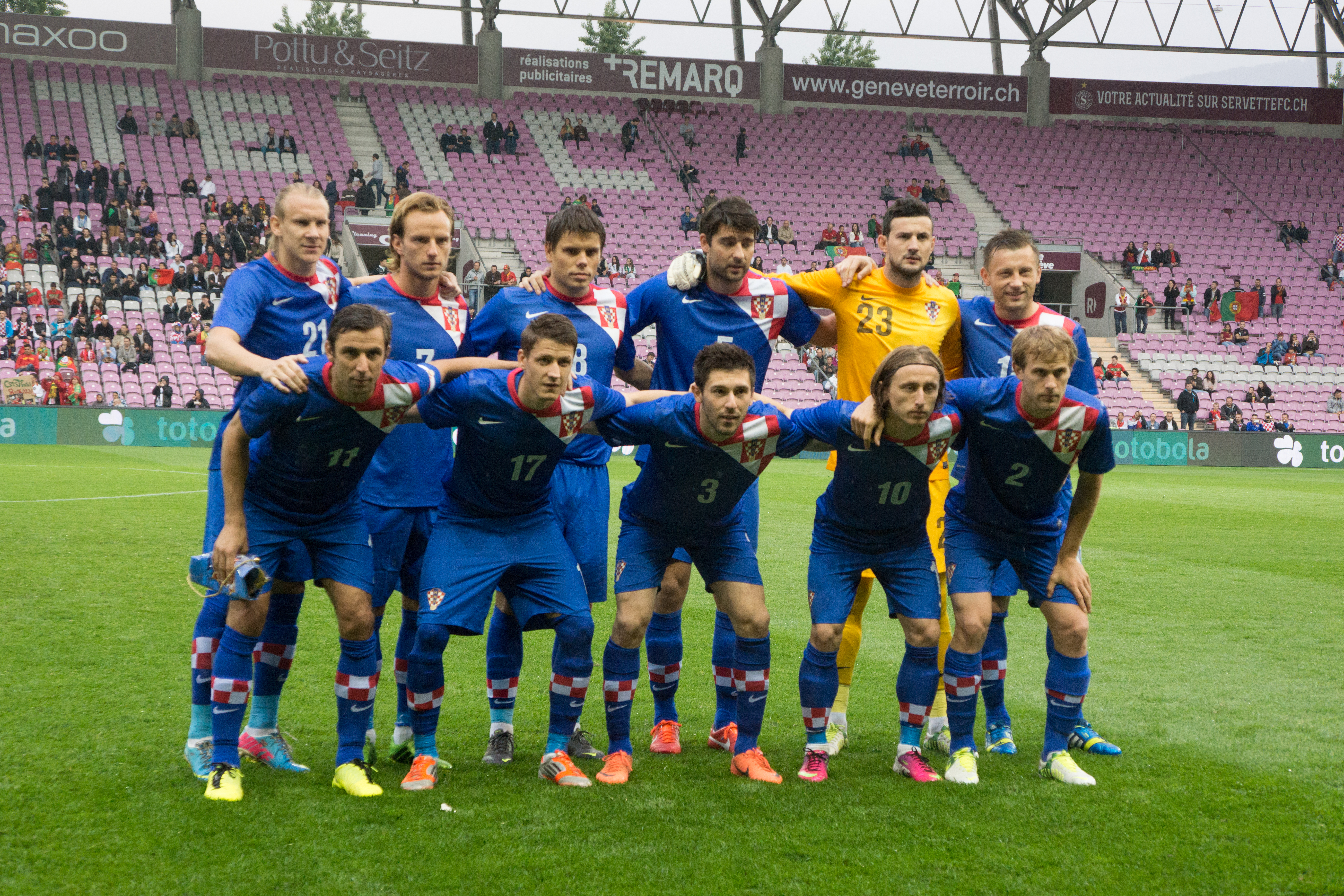 Équipe nationale croate de football. Debout : Domagoj Vida, Ivan Rakitic, Ognjen Vukojevic, Vedran Corluka, Danijel Subasic, Ivica Olic. Accroupis : Darijo Srna, Ivo Ilicevic, Hrvoje Milic, Luka Modric, Ivan Strinic.